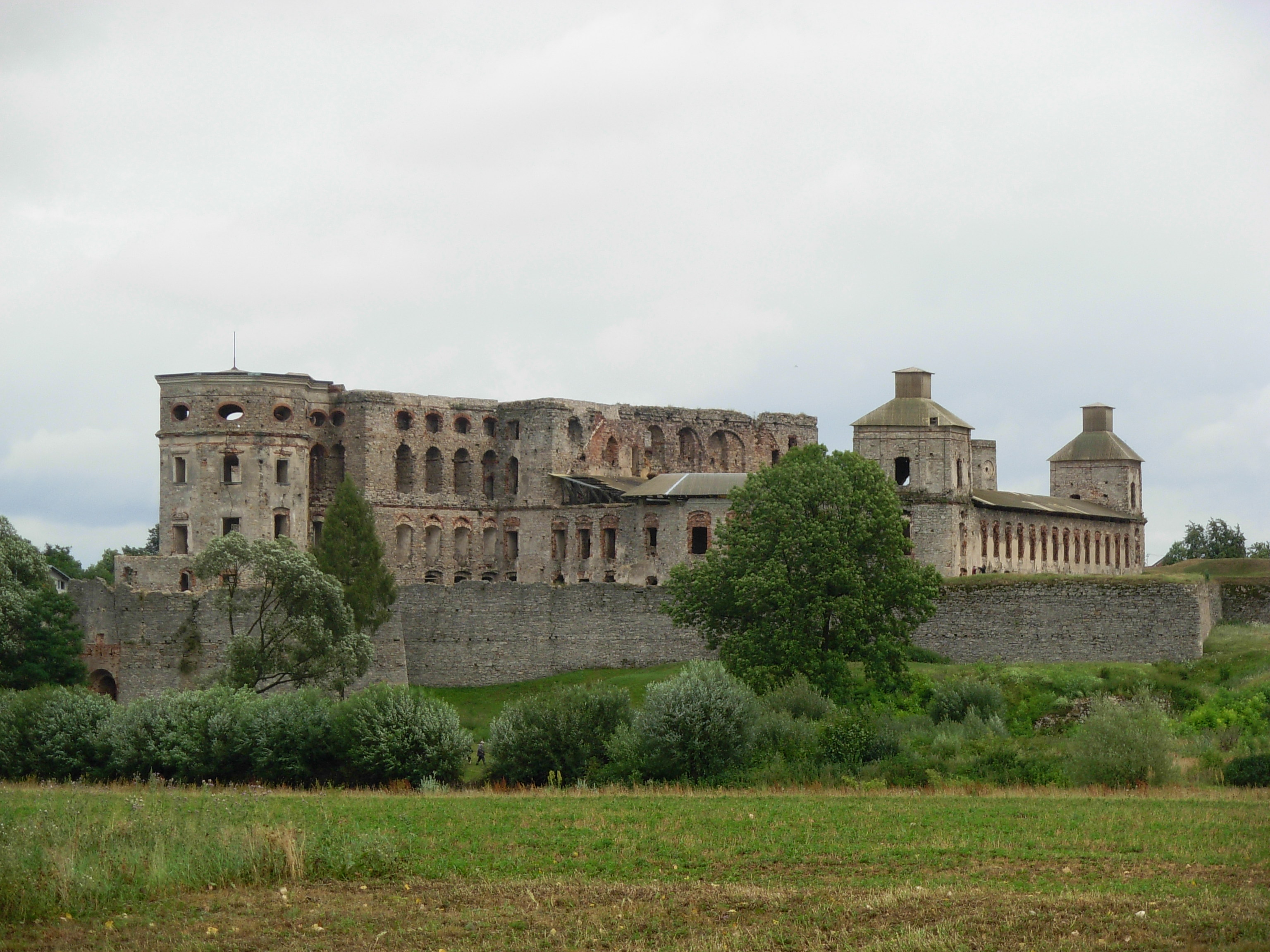 Krzyżtopór Castle in Ujazd village, Poland.